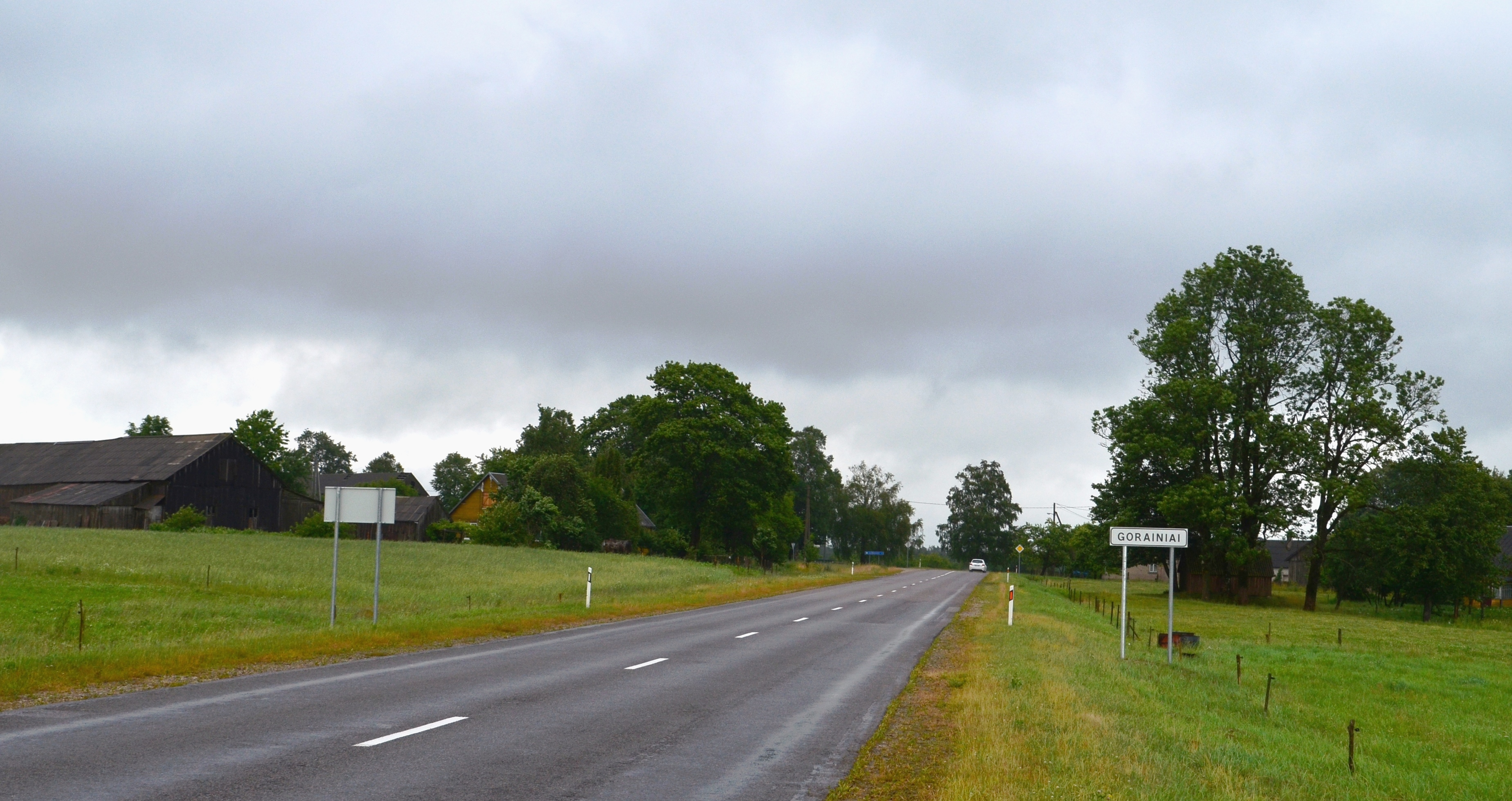 Gorainiai, Šilutės raj.